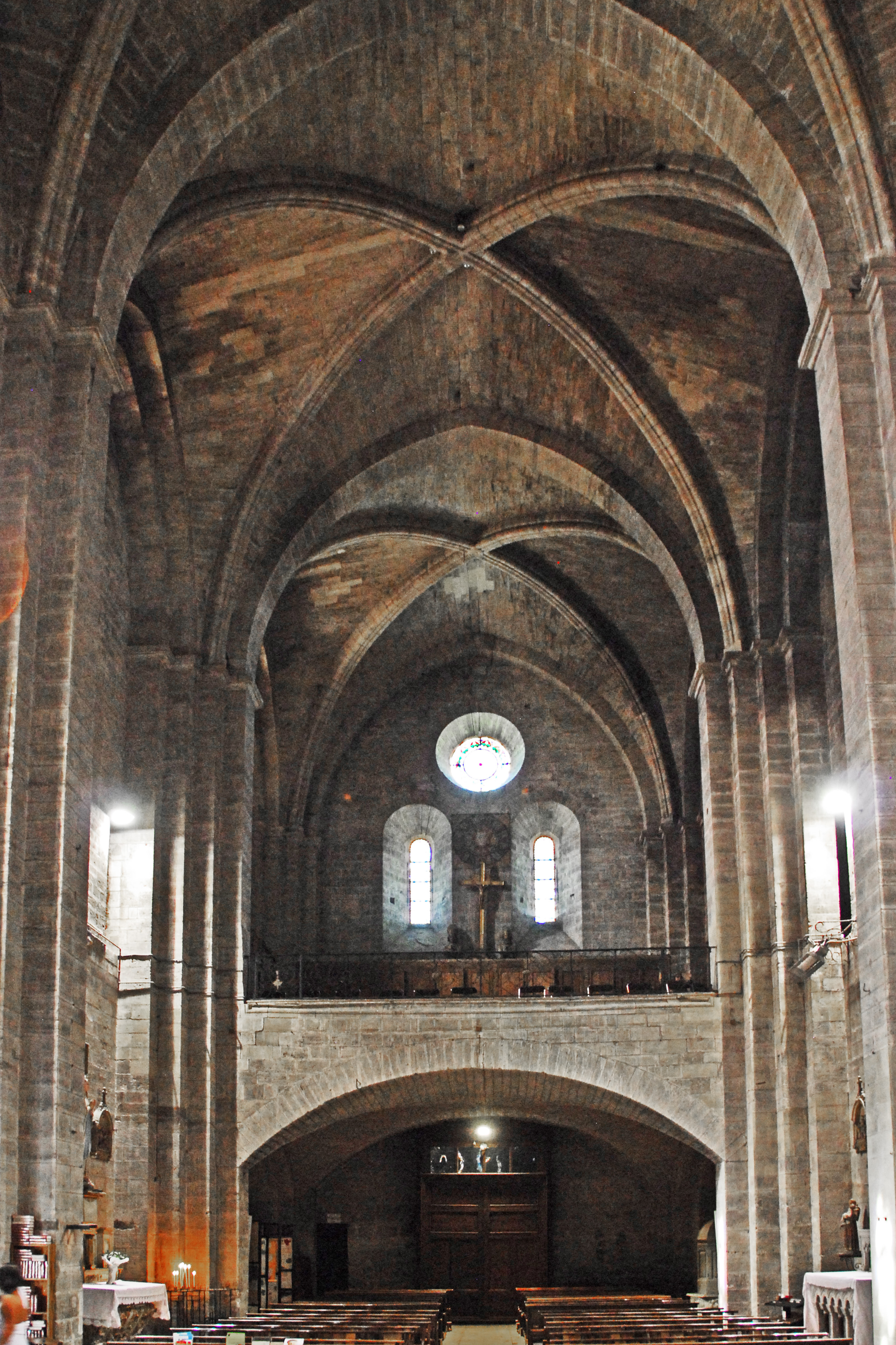 N-D-du-Lac du Le Thor, Schiff mit Empore und Fassadenwand